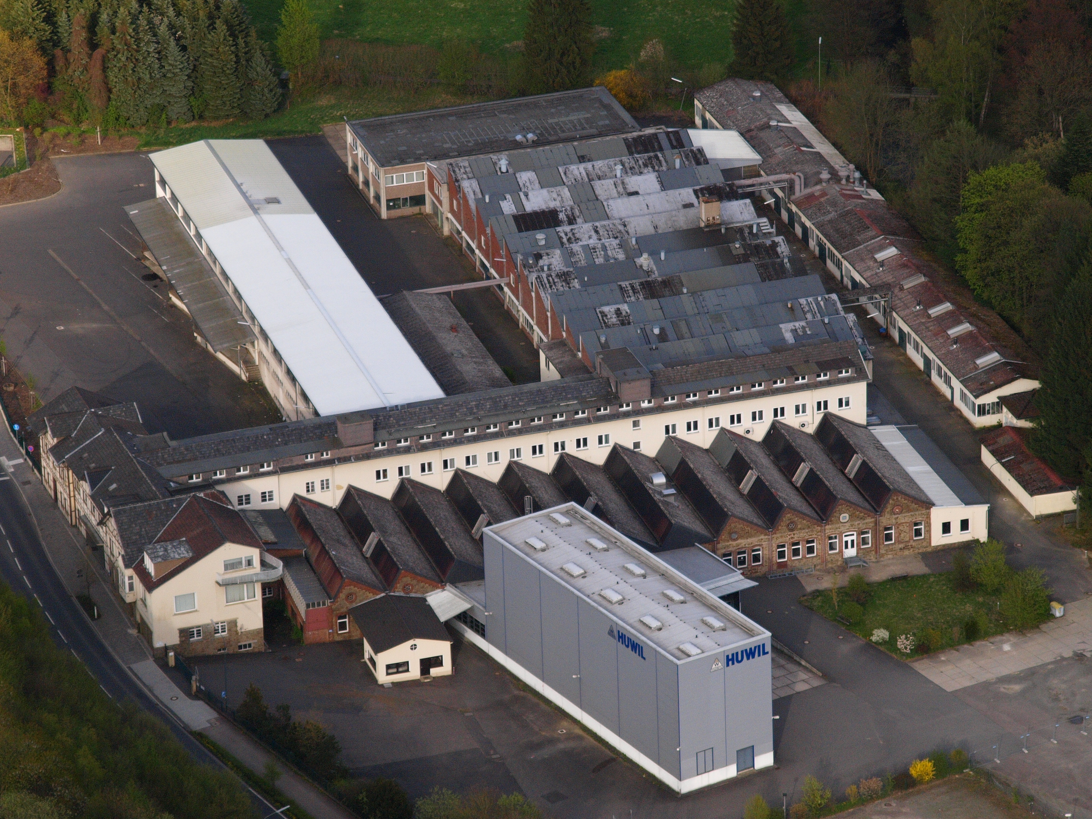 HUWIL-Werk in Ruppichteroth: Luftaufnahme